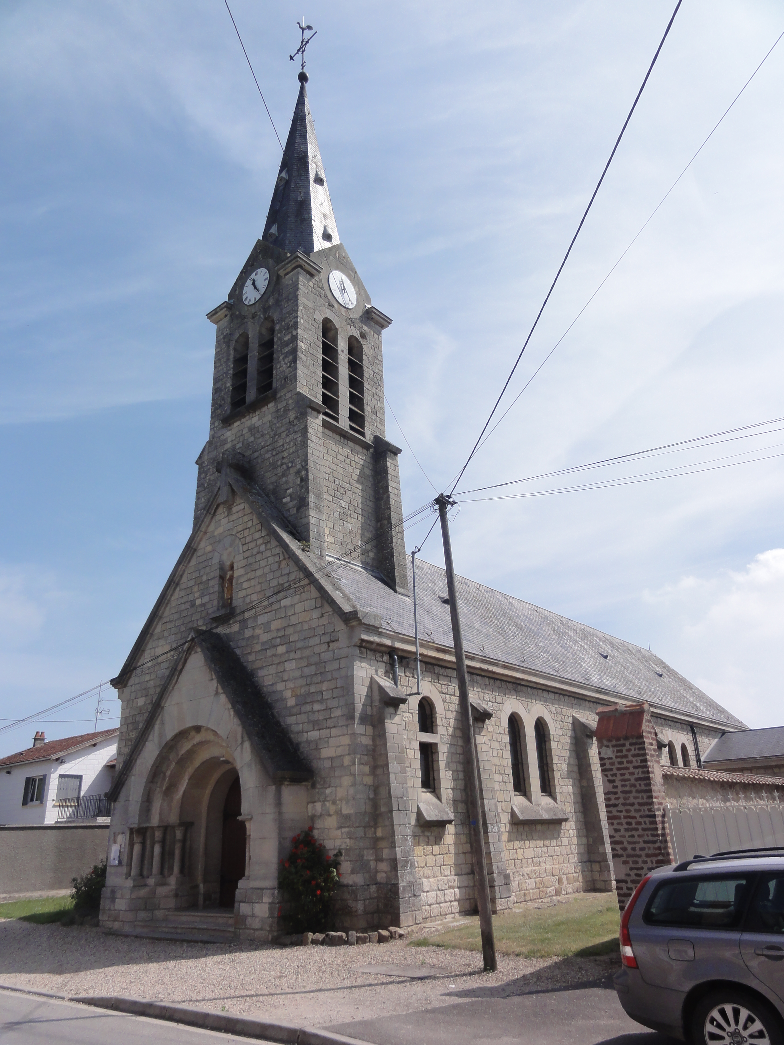 Pontavert (Aisne) Église